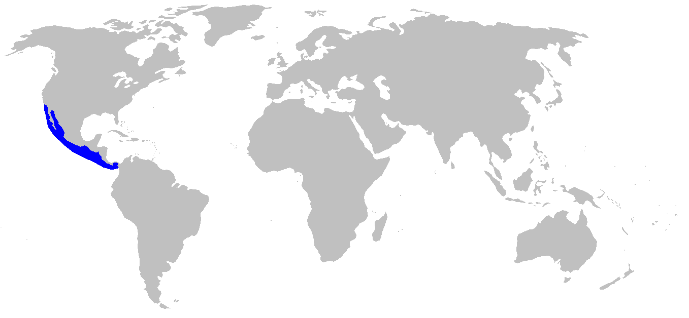 Distribution map for Mustelus lunulatus